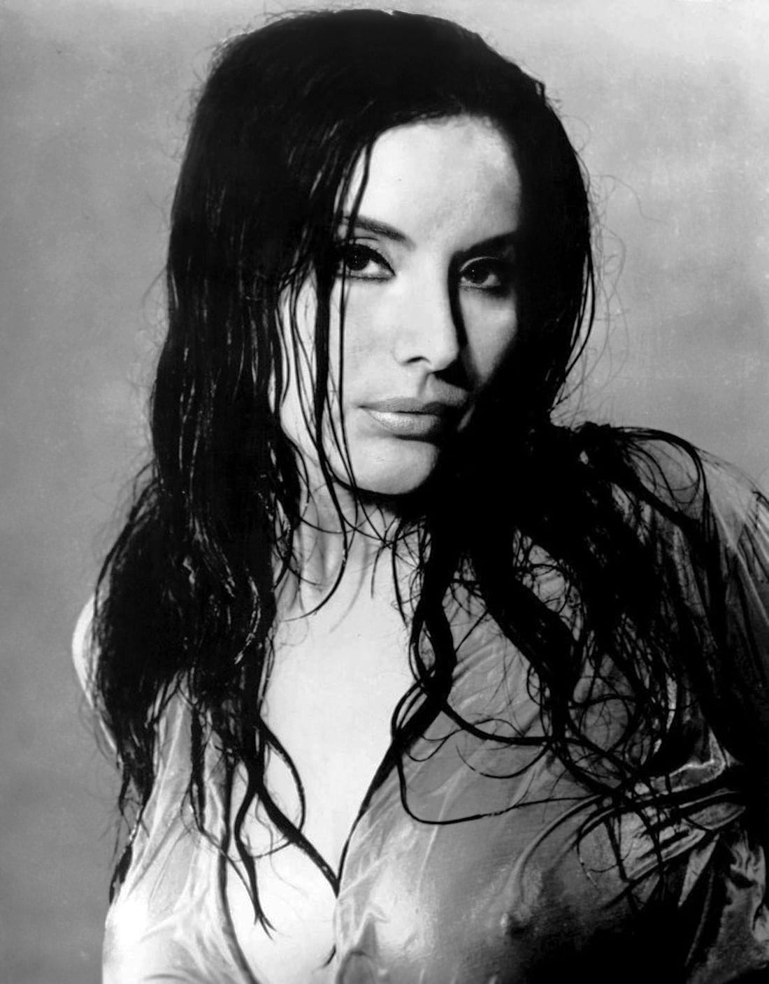 Retrato de la actriz Isabel Sarli.